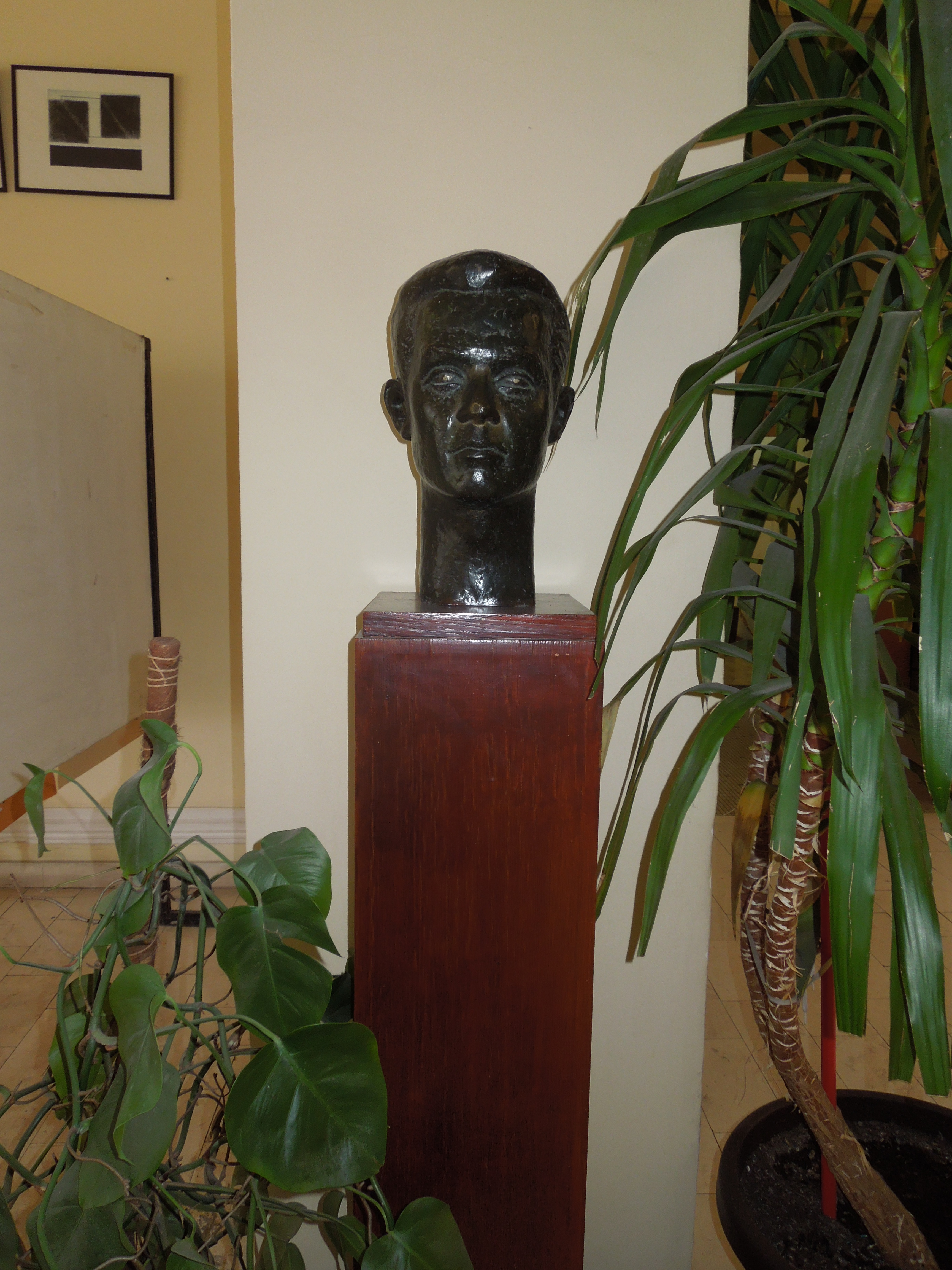 Биста Јована Јанићијевића у холу Гимназије у Смедереву